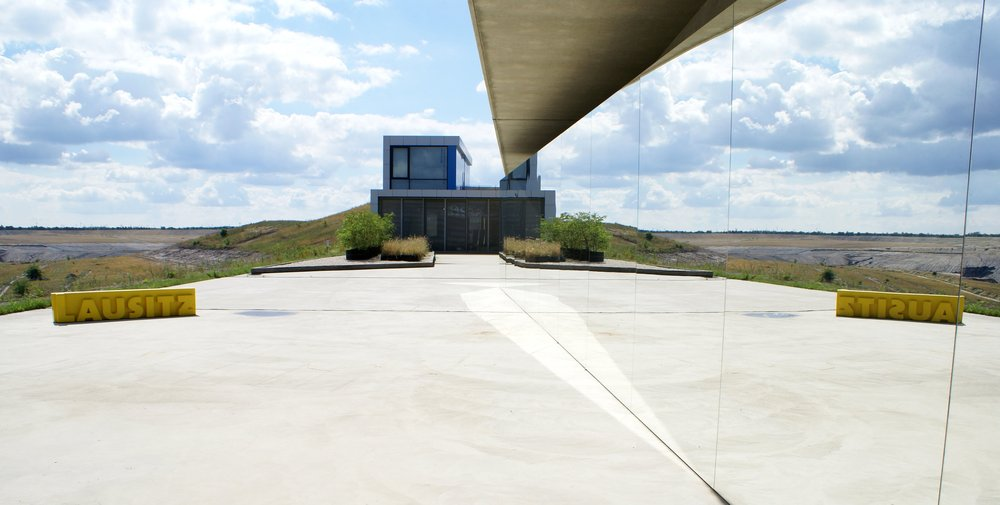 IBA-Terassen in Großräschen am Ilsesee (heute Großräschener See, Flutung 2007–2018)